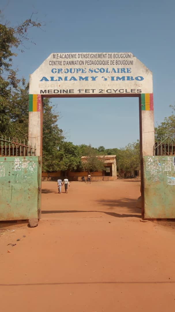 Concours wikichallenge écoles d'Afrique 2019 - Le Groupe Scolaire Almamy Timbo de Médine - Bougouni